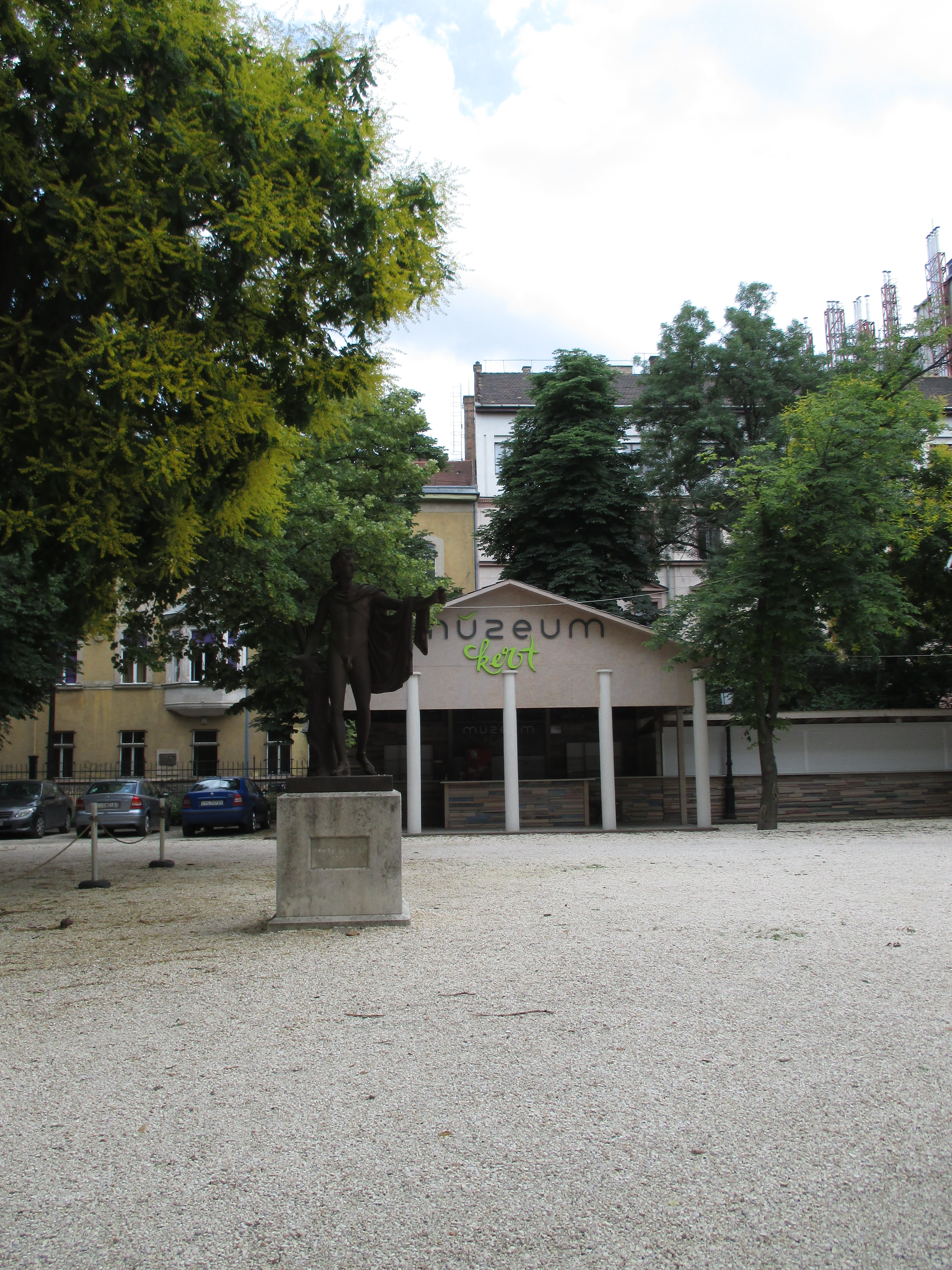 Belvederei Apolló-szobor, kerti pavilon és parkoló részlete a Múzeumkertben, Budapest